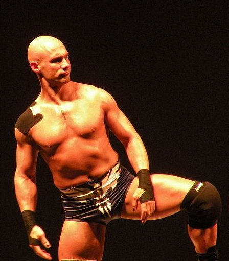 Christopher Daniels tna paris zenith